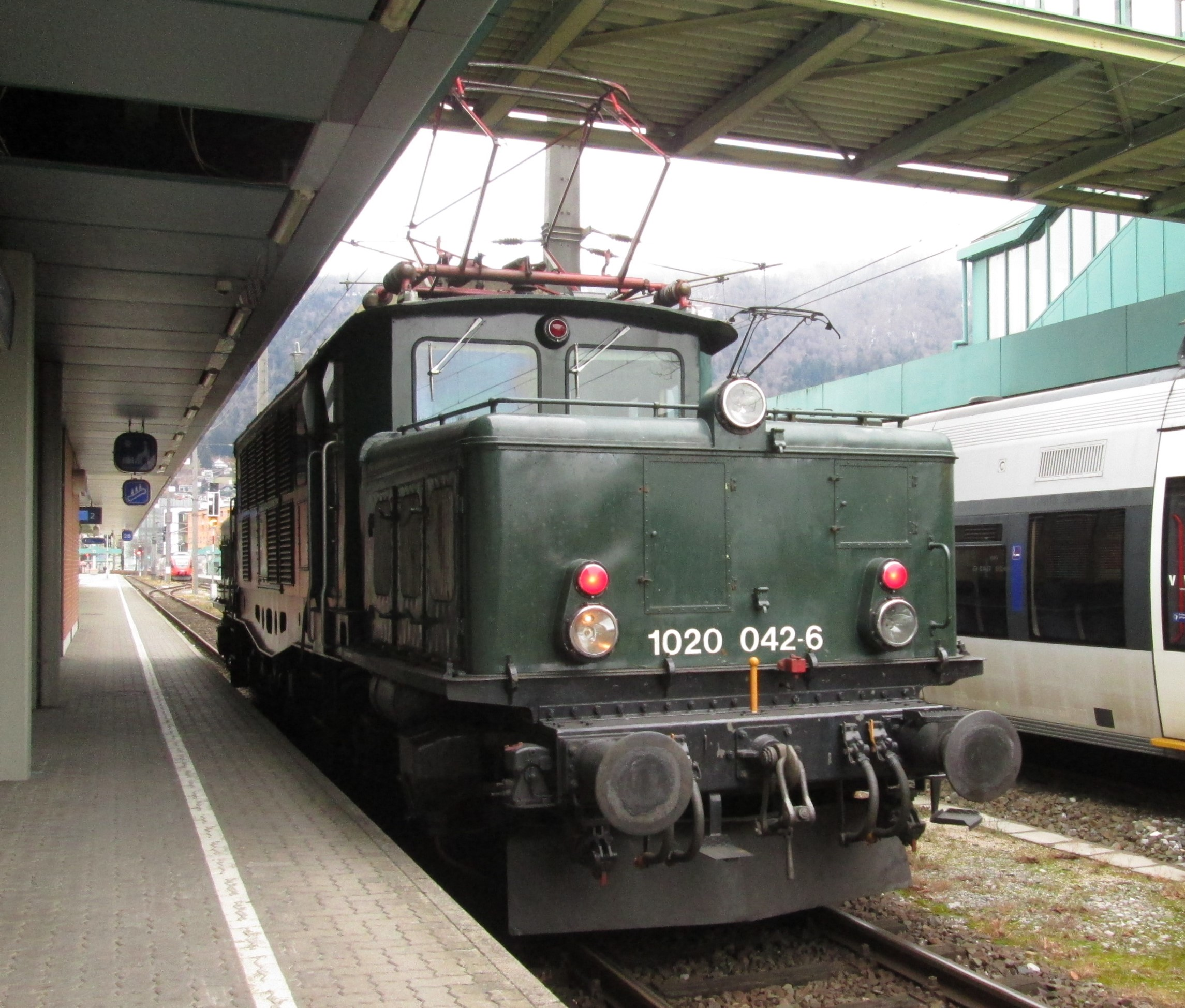 1020 42-6 am 20. Februar 2016 im Hauptbahnhof Bregenz